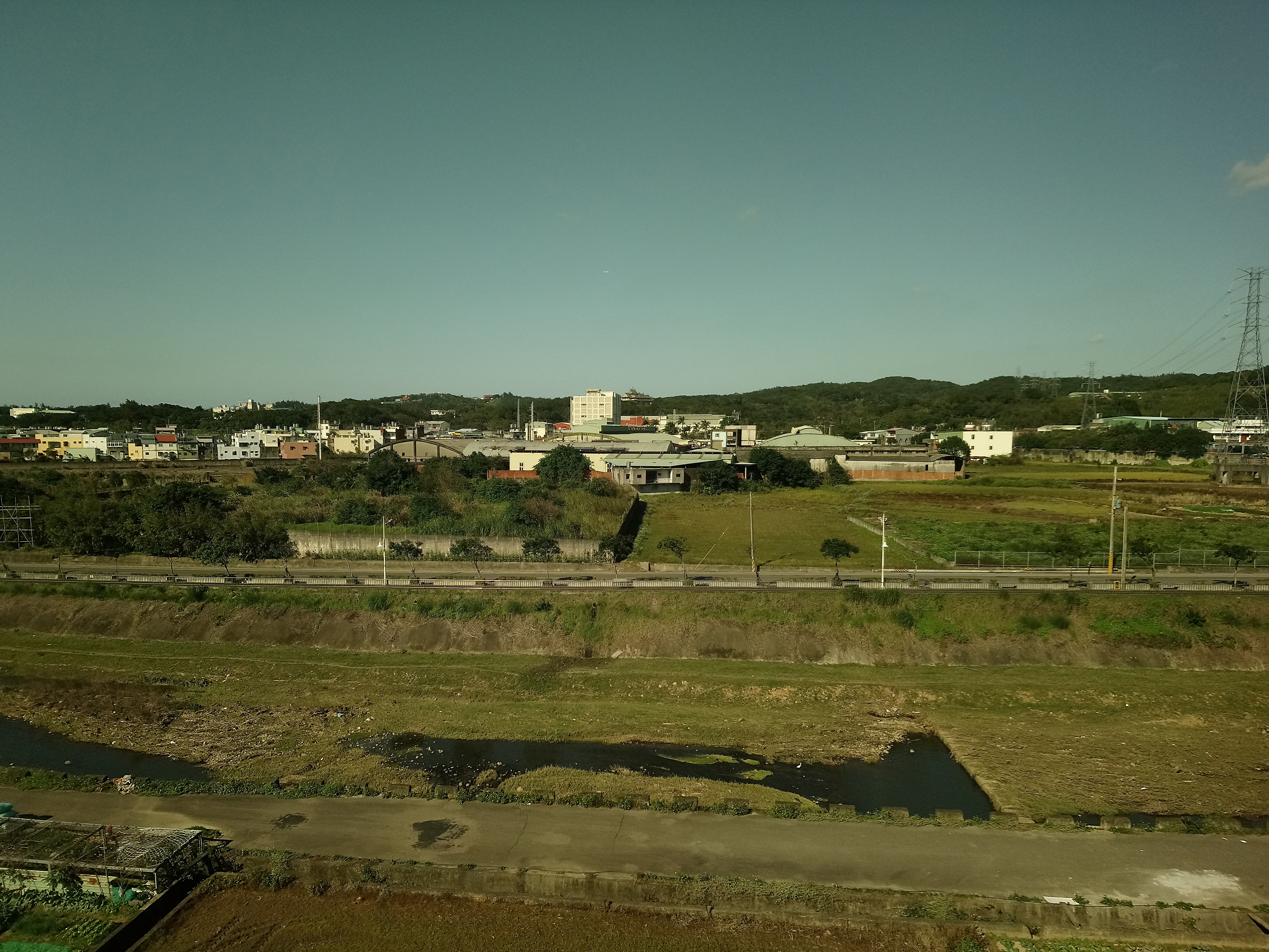 流經坑子外的坑子溪,桃園市蘆竹區南崁地區外社里